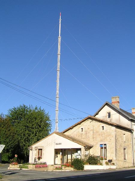 émetteur de Maisonnais, Deux-Sèvres, Cher (18), France